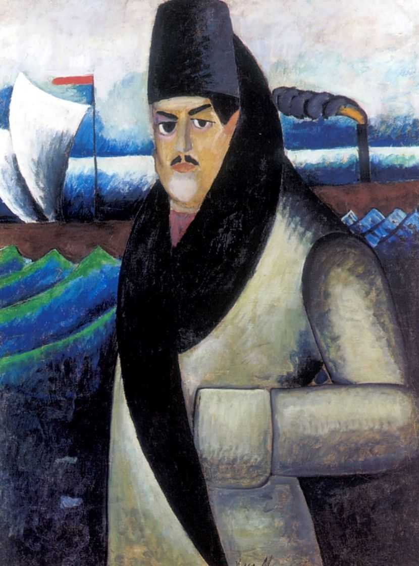 Машков Илья Иванович. Автопортрет. 1911